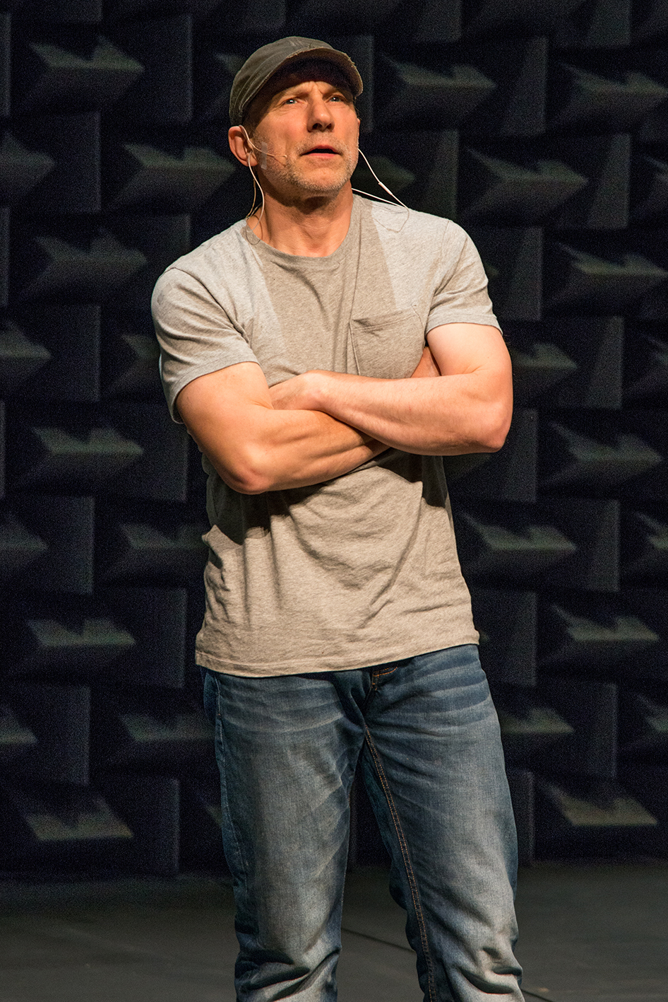 Simon McBurney in "The Encounter" (Théâtre de Complicité), World Premiere at the Edinburgh International Festival, August 2015